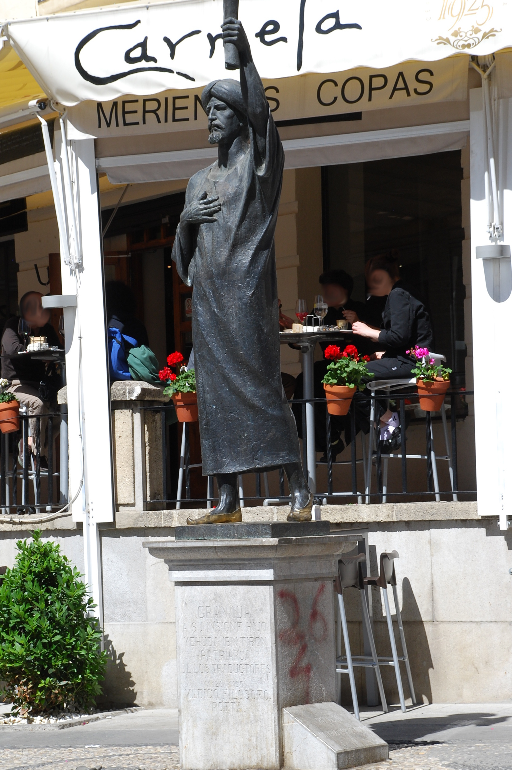 Yehuda ibn Tibon